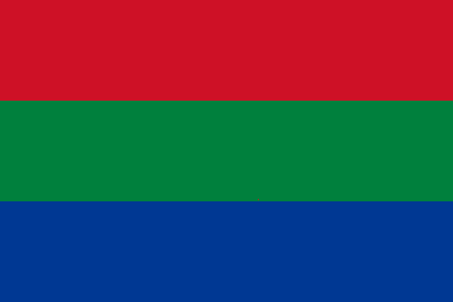 Bandera de Arajuno